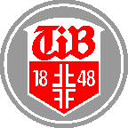 Vereinswappen der Turngemeinde in Berlin 1848 e.V.